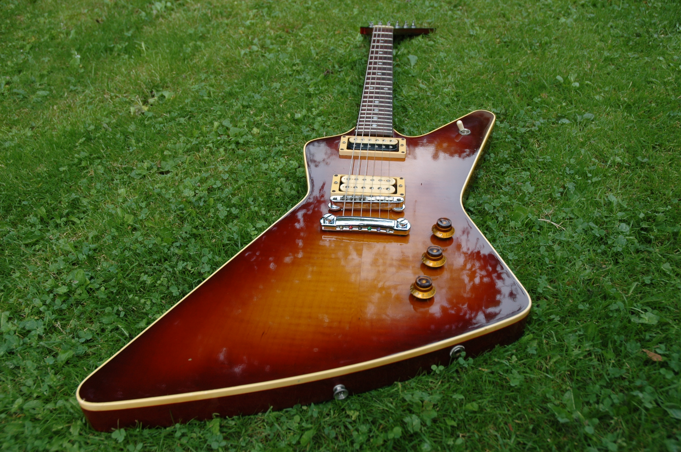 Eigen foto, gitaar in mijn bezit